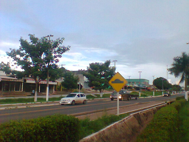 Jardins do canteiro central e veículos circulando na rodovia Paulo Fontelles - centro de Goianésia